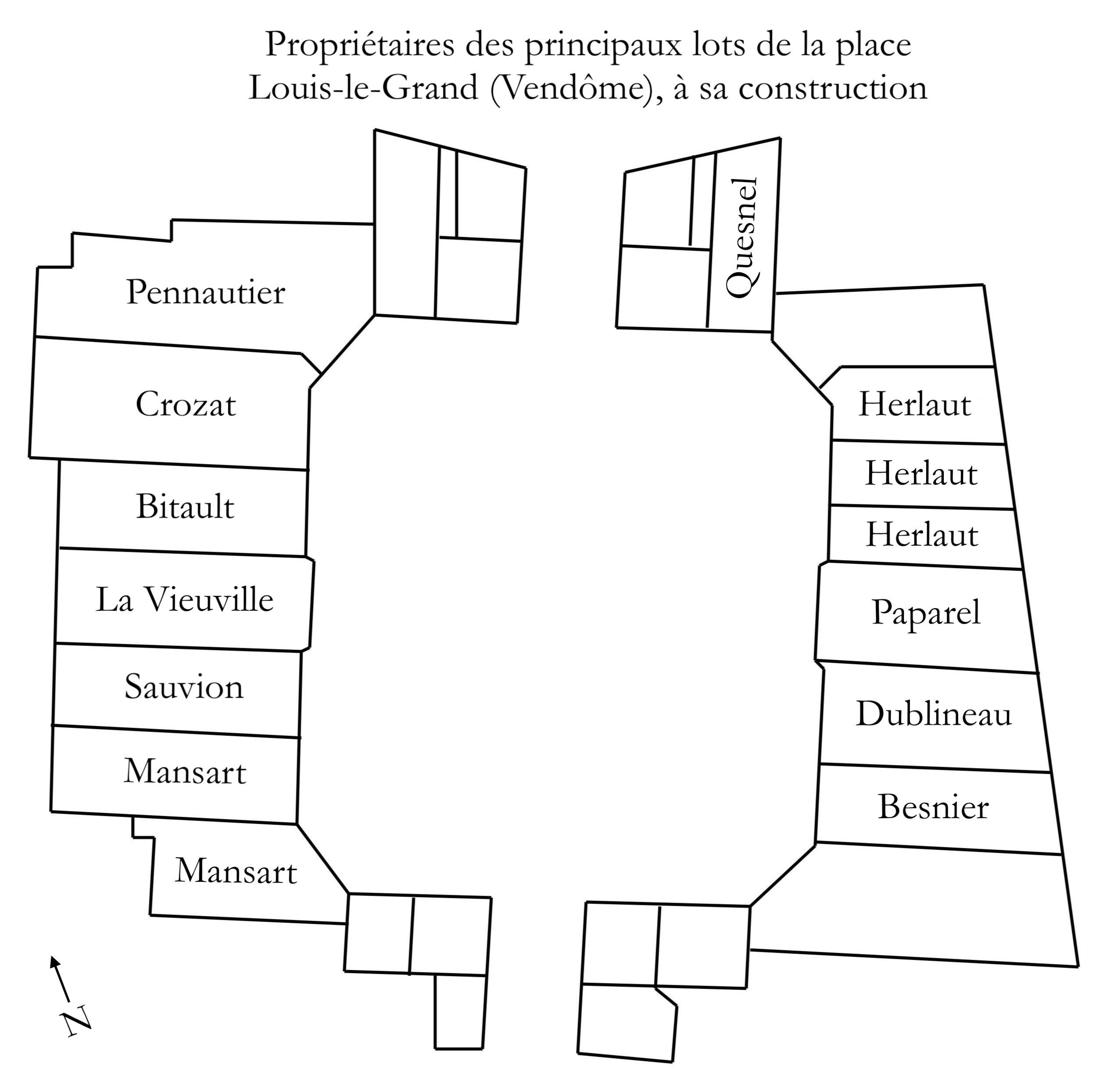 Nom des différents propriétaires des lots constituant la place Vendôme (Louis-le-Grand) à sa création au début du XVIIIe siècle.